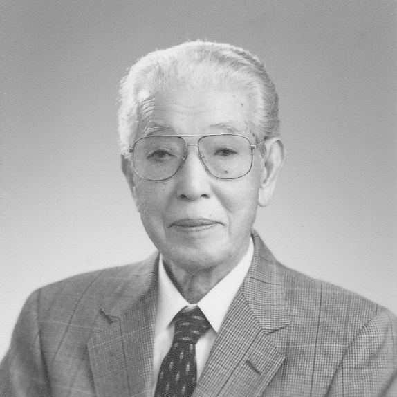 新短歌人福田廣宣氏の写真